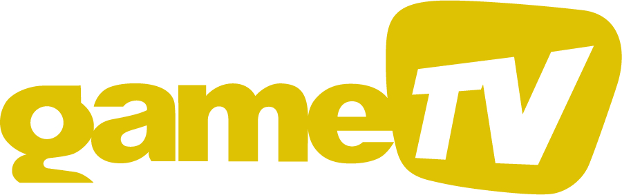 GameTV